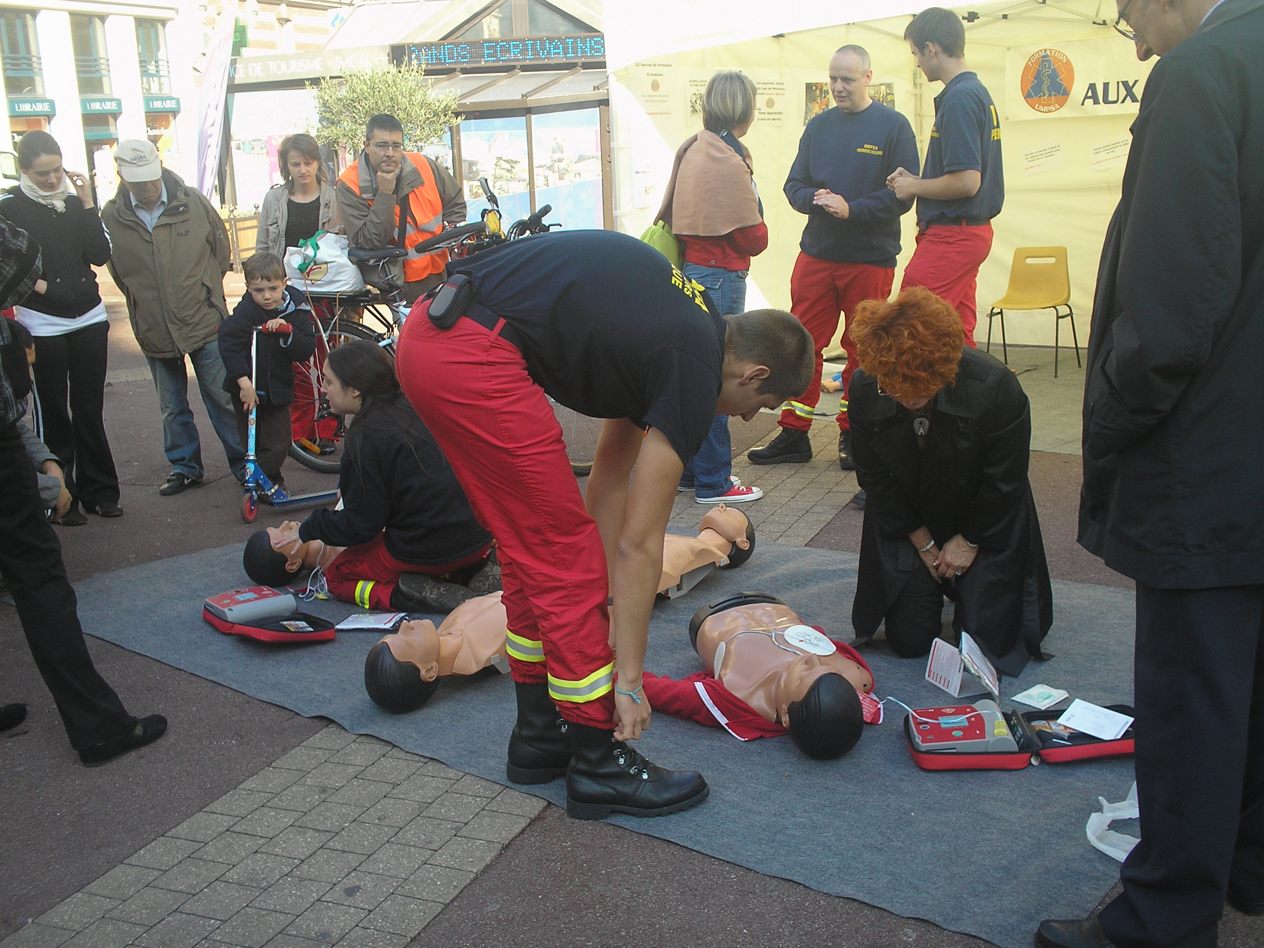 Sensibilisation à l'usage de défribillateur par l'UMPSA 92